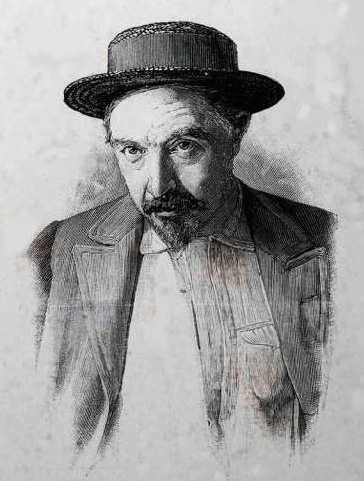 J.-H. Rosny aîné. Détail de la une de L'Illustration du samedi 1er août 1896, n° 2788 (54e année) dépeignant les huit membres de l'académie des Goncourt.